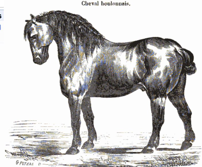 Gravure d'un cheval boulonnais dans le second volume des cours d'hippologie pour les officiers de l'armée, par Alexandre-Bernard Vallon